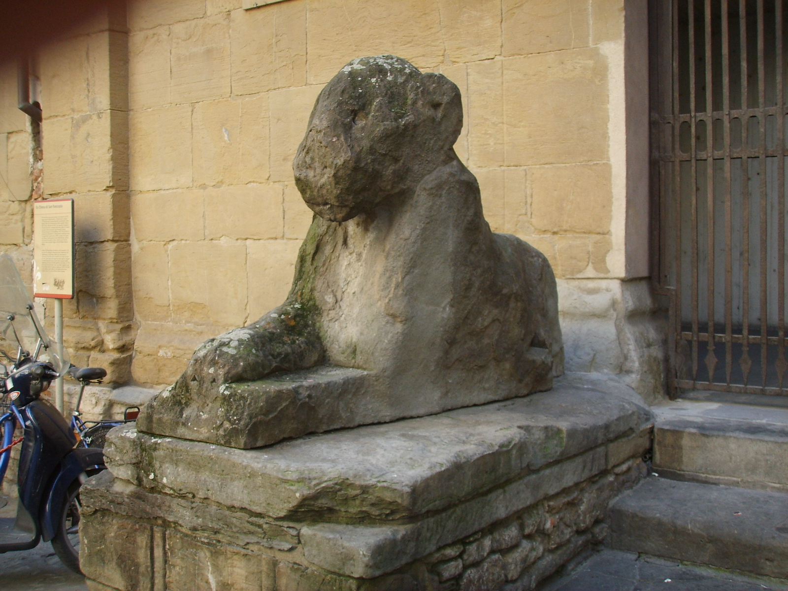 Statua di leone davanti all'ex chiesa di San Pancrazio a Firenze.